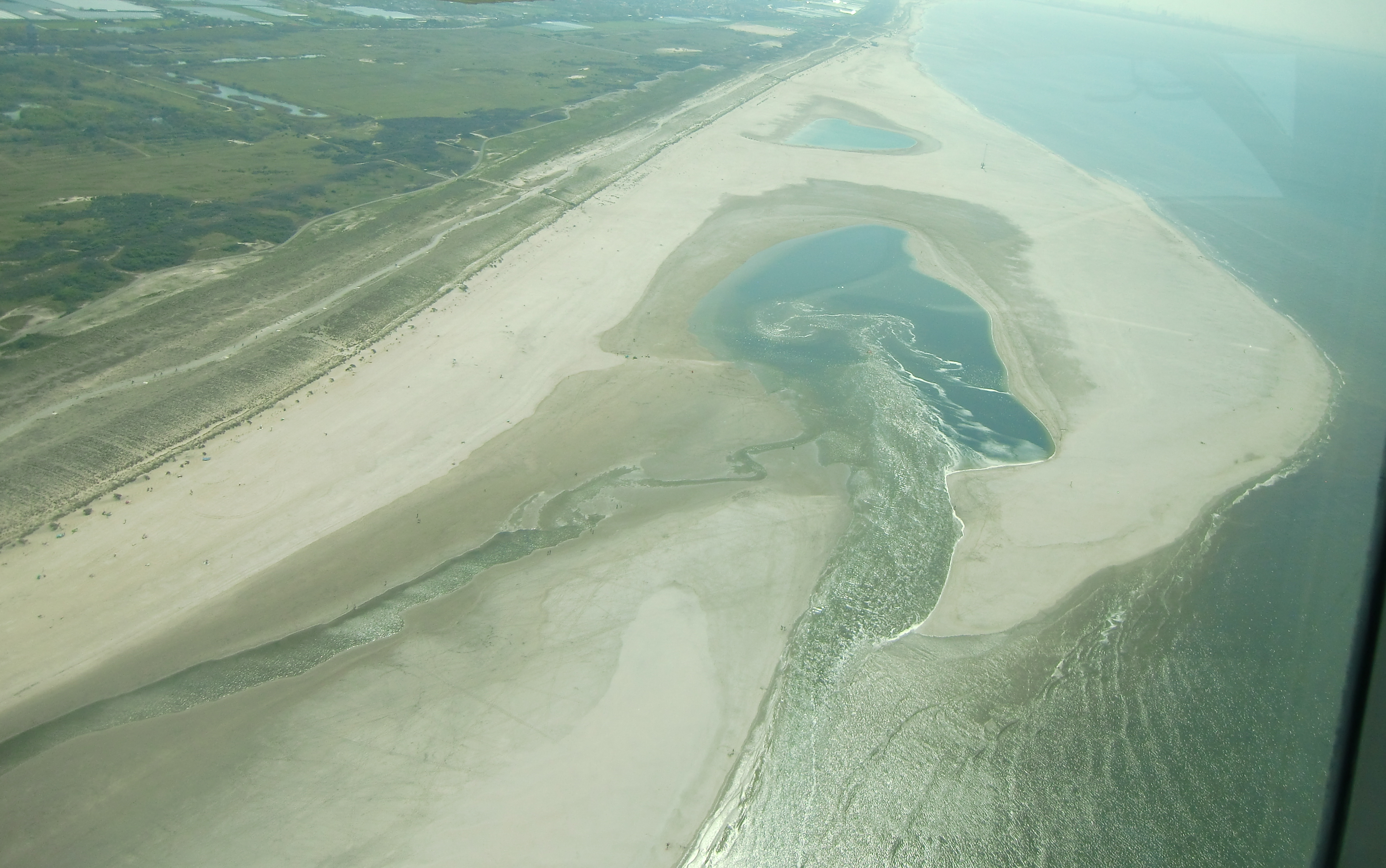 Zandmotor vanuit de lucht